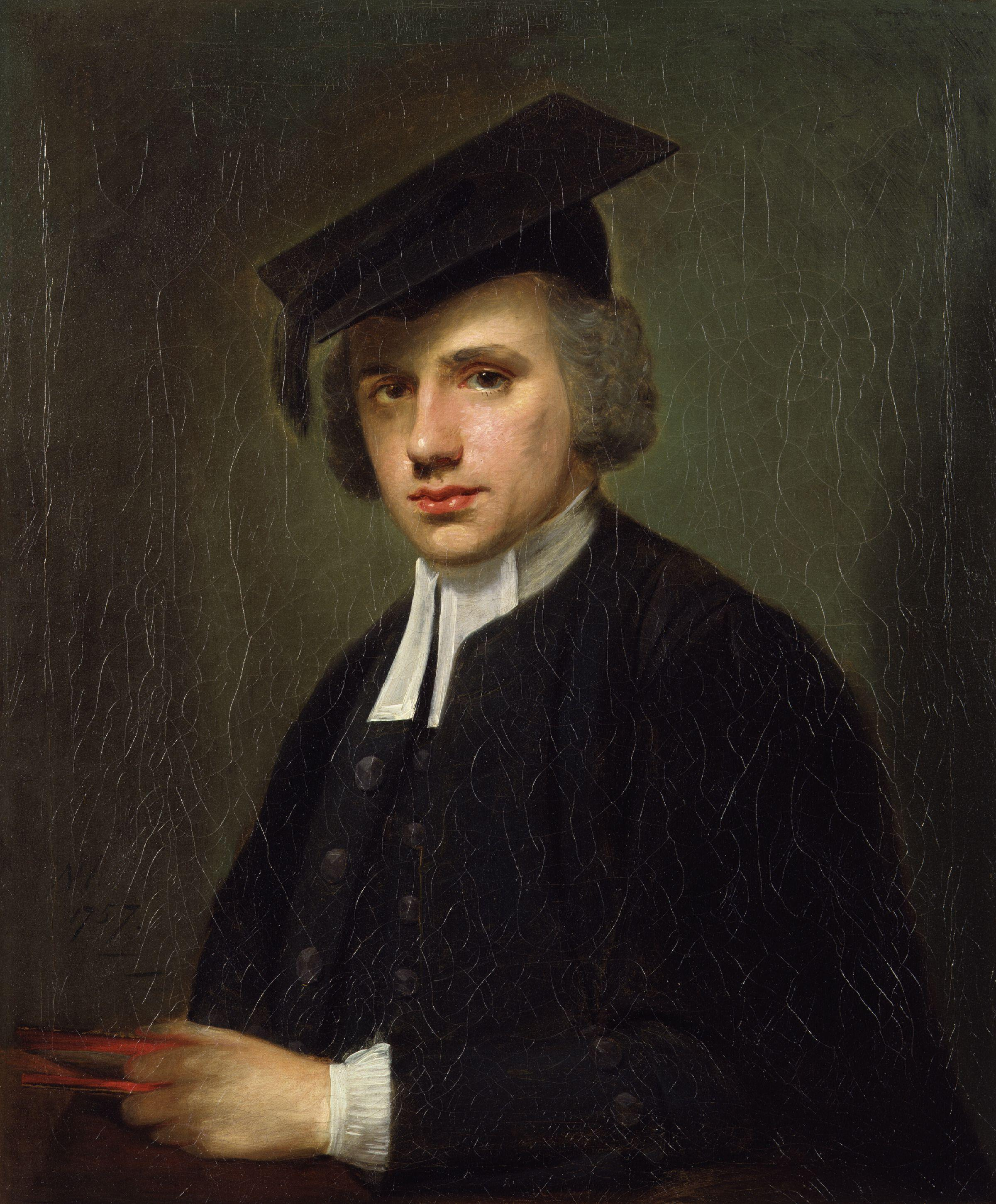 John Hinchliffe